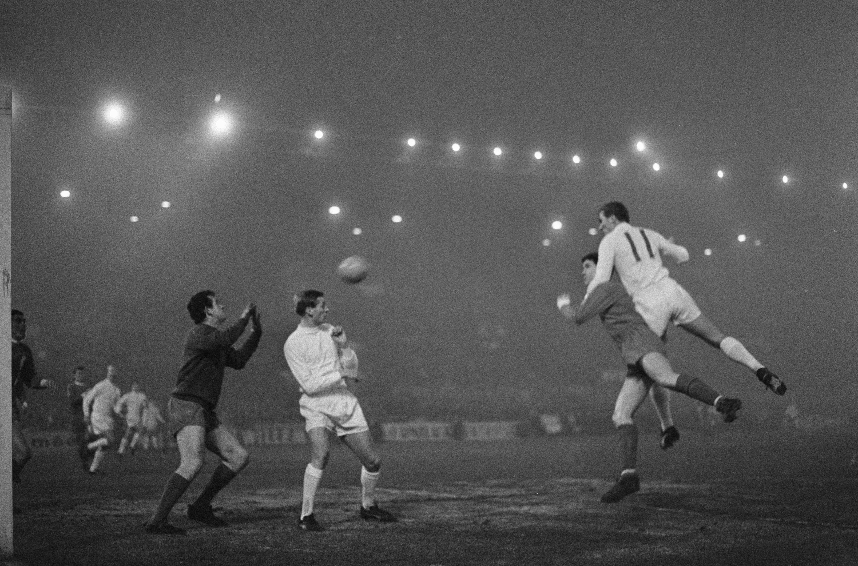 Collectie / Archief : Fotocollectie Anefo Reportage / Serie : [ onbekend ] Beschrijving : Europacup I. Ajax tegen Liverpool 5-1, Cees de Wolf (rechts) scoort 1-0, links keeper Lawrence, midden Nuninga Annotatie : Befaamde ´Mistwedstrijd´ Datum : 7 december 1966 Locatie : Amsterdam Trefwoorden : sport, voetbal Persoonsnaam : Wolf, Cees de Fotograaf : Nijs, Jac. de / Anefo Auteursrechthebbende : Nationaal Archief Materiaalsoort : Negatief (zwart/wit) Nummer archiefinventaris : bekijk toegang 2.24.01.05 Bestanddeelnummer : 919-8566